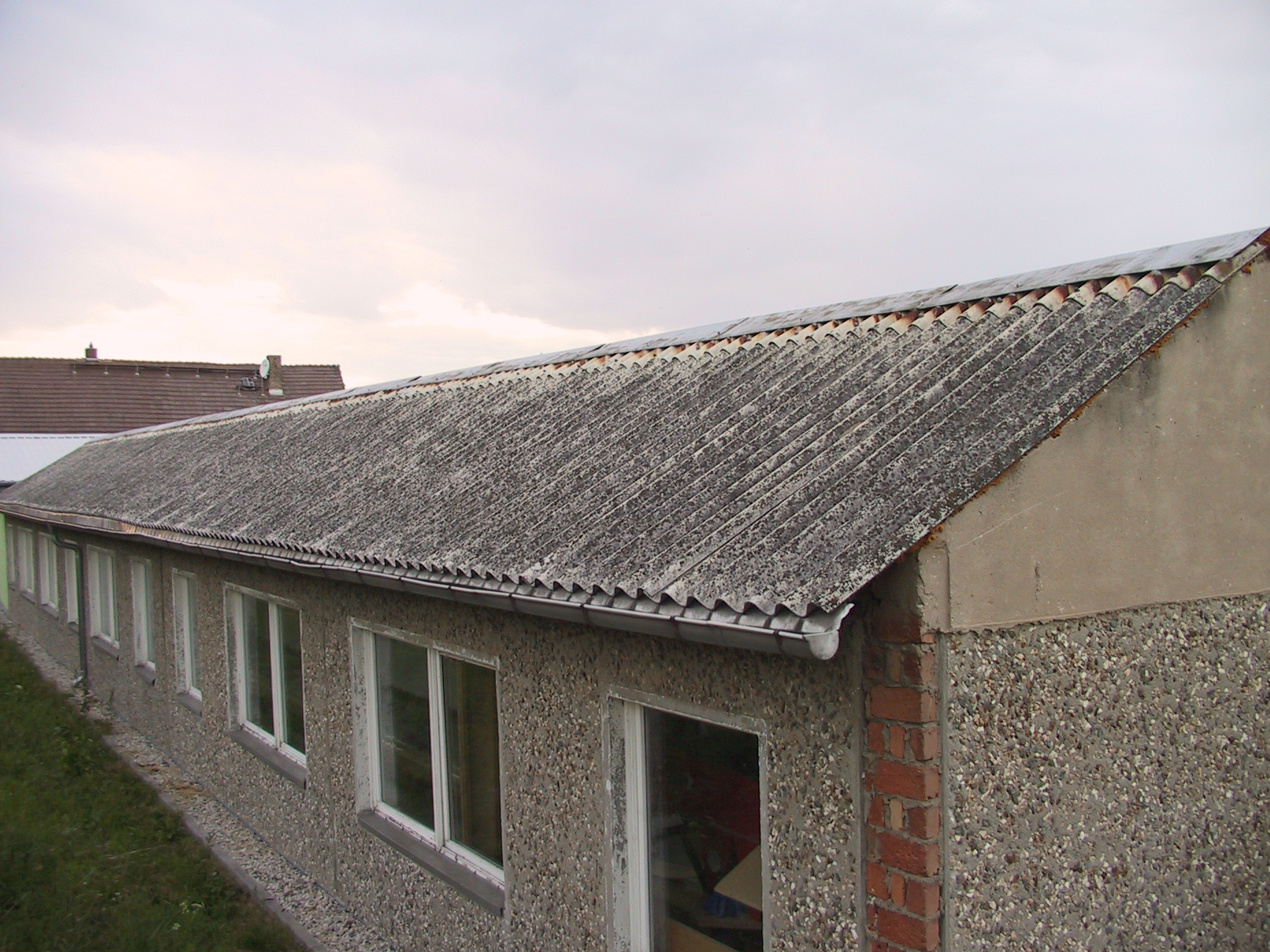 Dach aus Wellasbest, Aufnahme vom 03.07.2005)